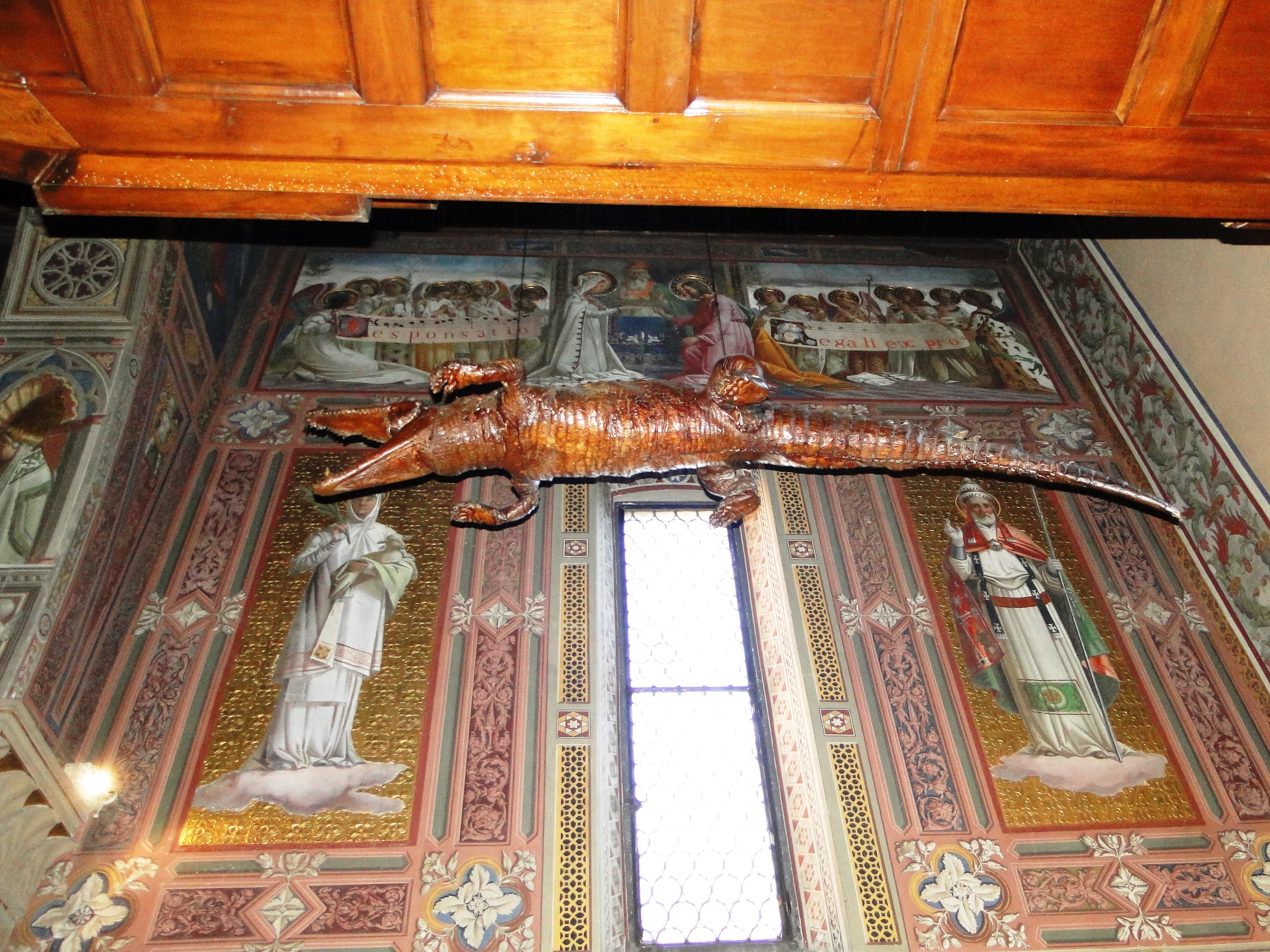 Chiesa Santa Maria Annunziata, dettaglio del Coccodrillo. Ponte Nossa (BG)